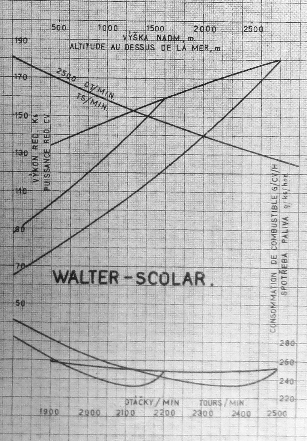 letecký motor Walter Scolar (1936), charakteristiky